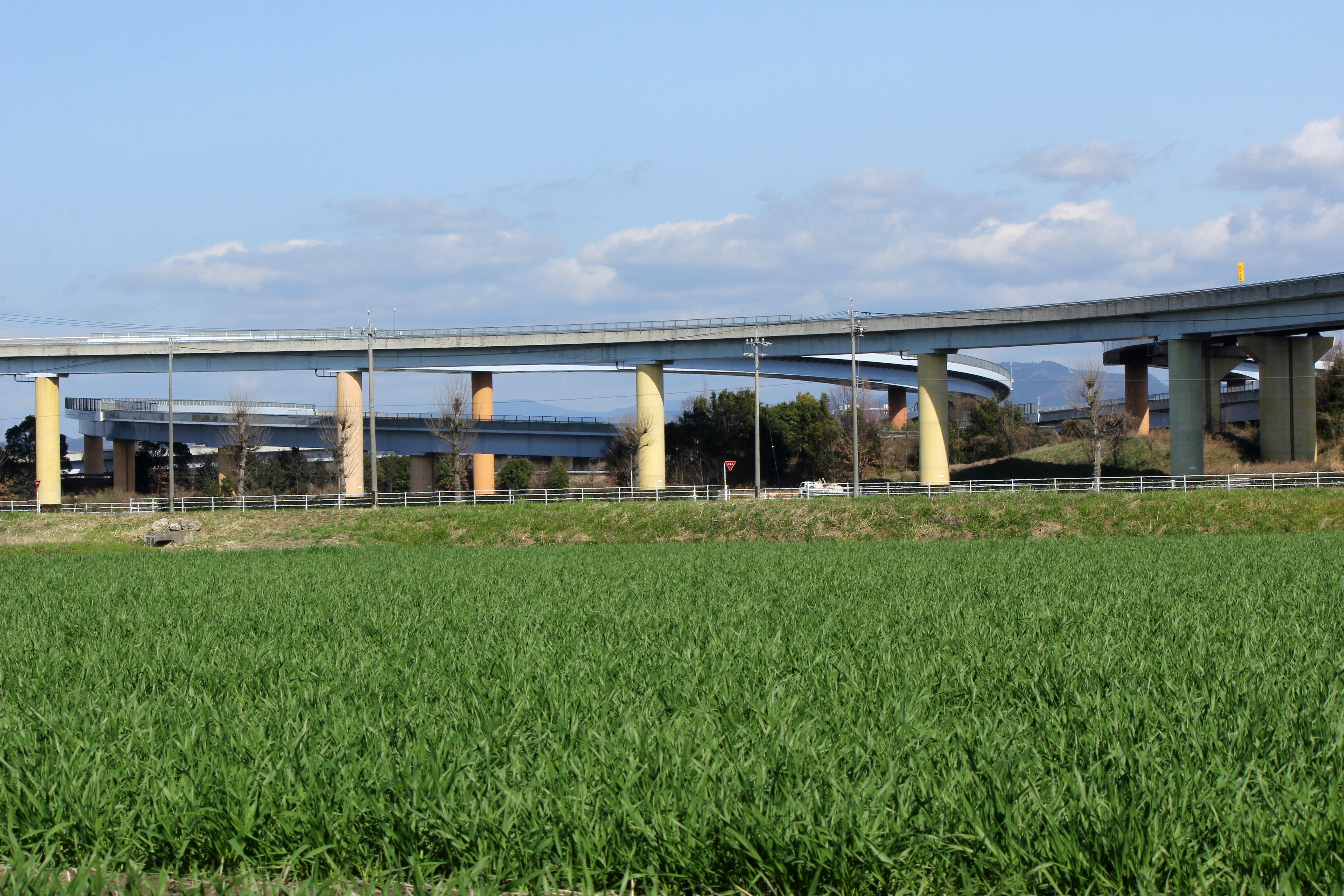 豊田ジャンクションのカラーコンクリート